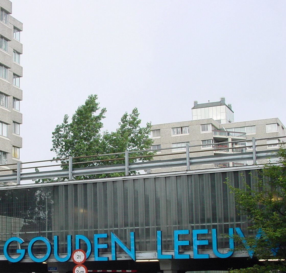 parkeergarage en woontorens van Gouden Leeuw met de naam in blauwe neonletters